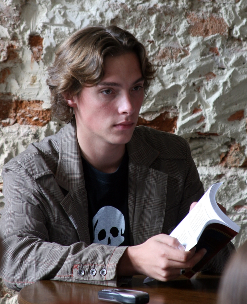 Андрей Любка, украиноязычный литератор